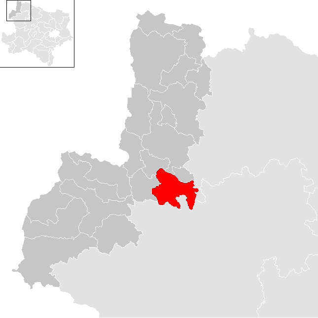 Bezirk Gmünd